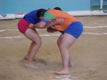 Lucha canaria en Puerto del Rosario